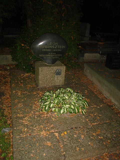 Leon Rubinsztein's grave in Warsaw Powazki Cmentarz Wojskowy cemetery